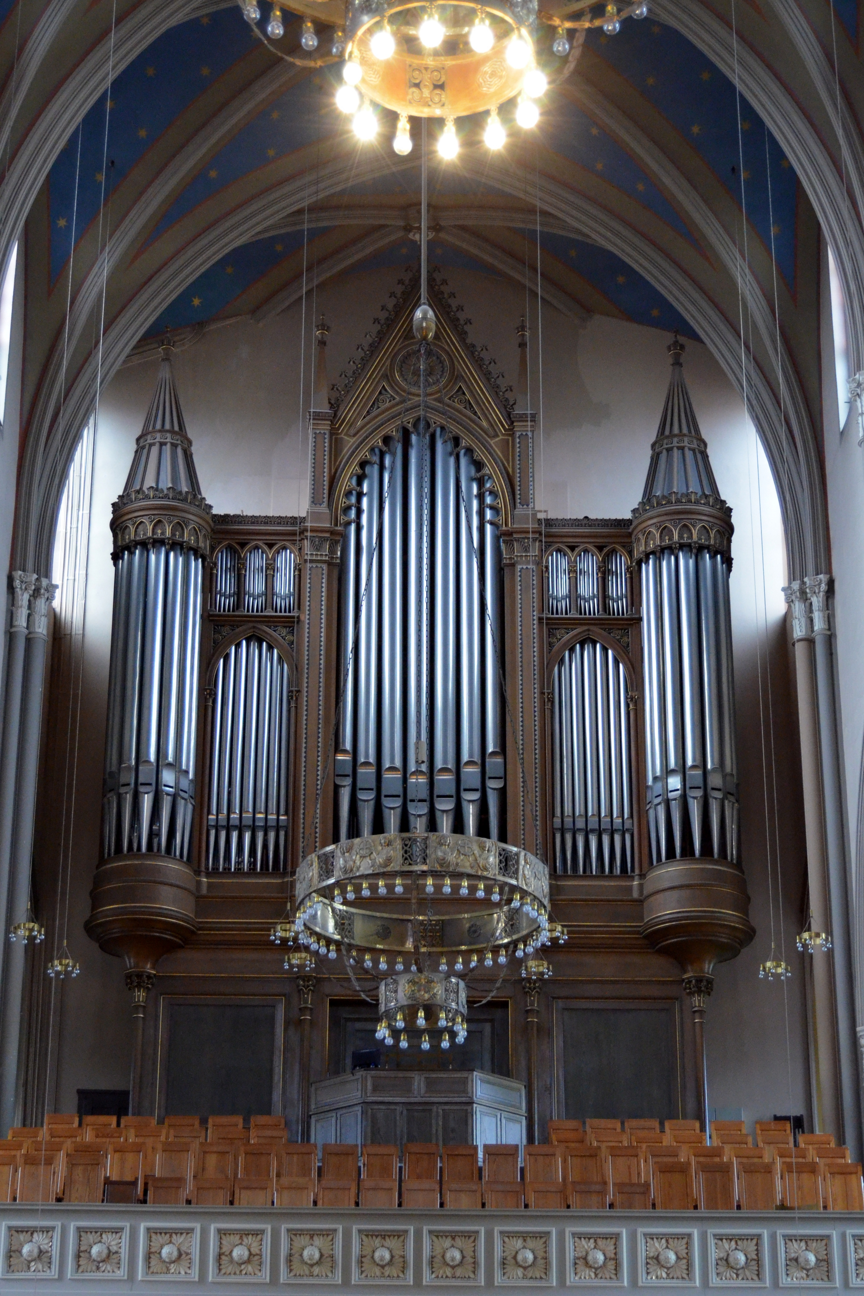 Hoofdorgel